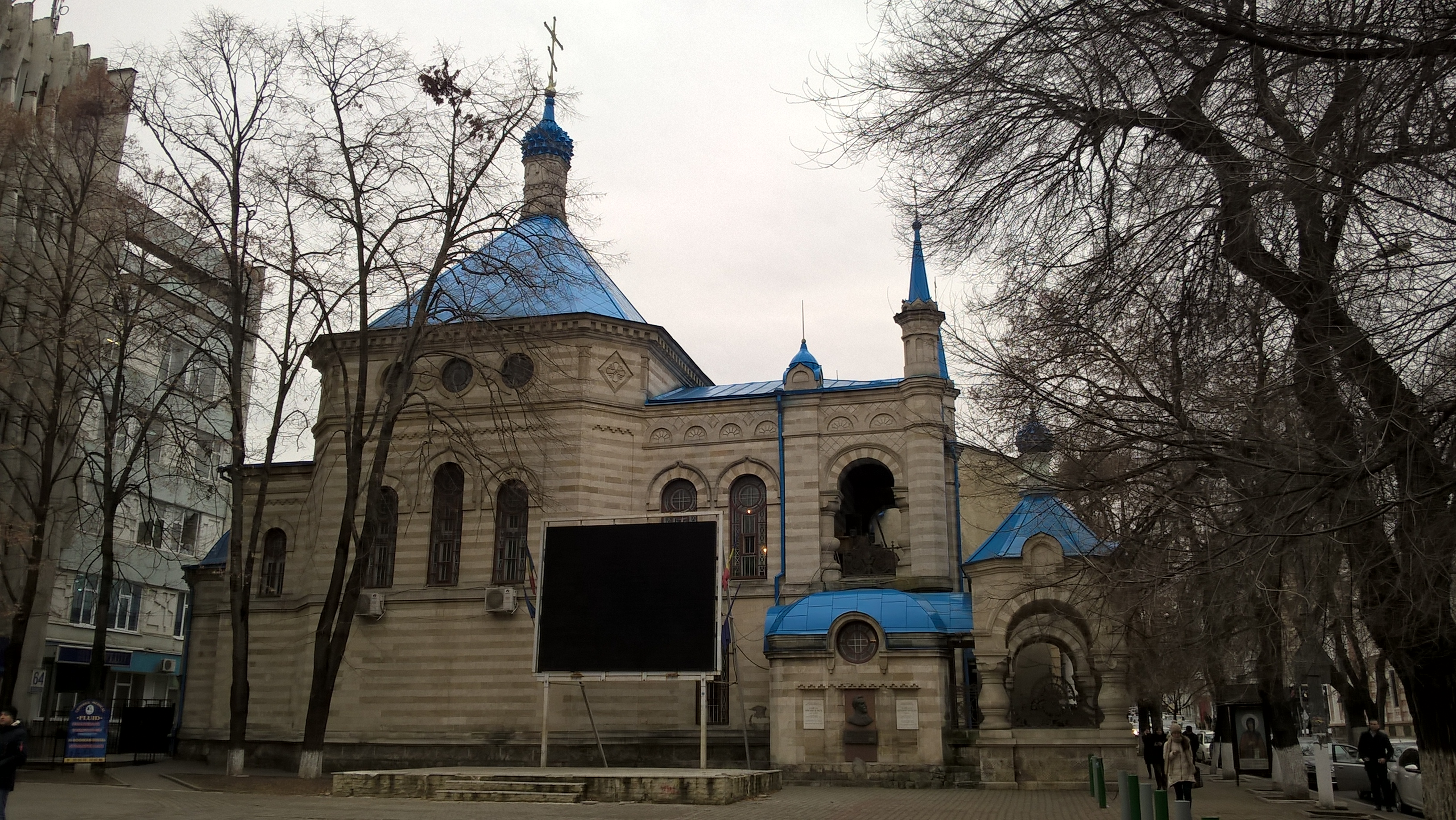 Cerkiew św. Teodory z Sihli w Kiszyniowie